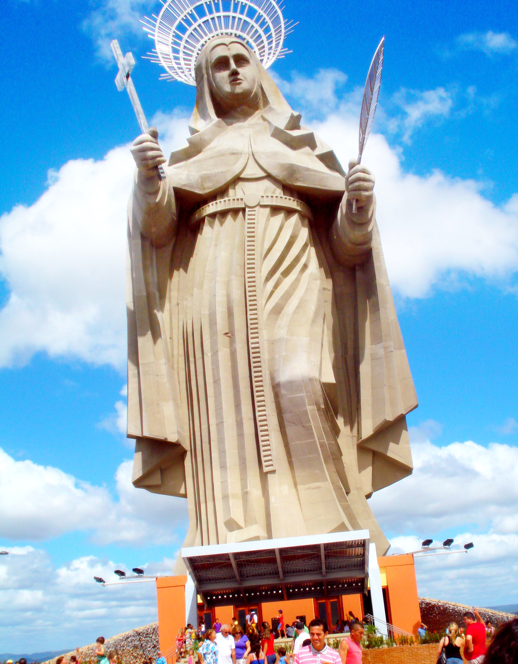 Estátua de Santa Rita de Cássia - O maior monumento católico do mundo - Santa Cruz (RN)